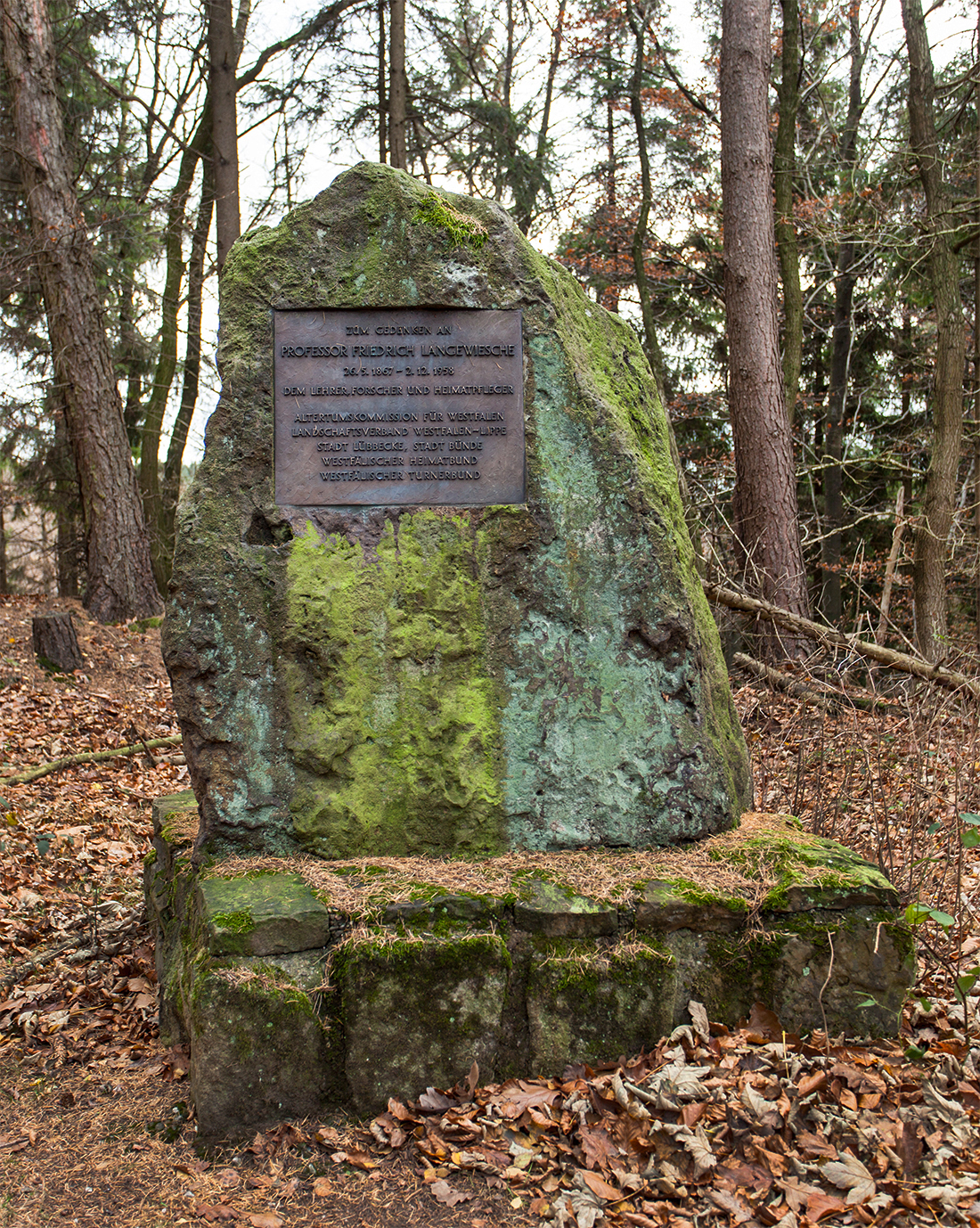 Babilonie, Denkmal für Friedrich Langewiesche am höchsten Punkt der Wallburg im Süden